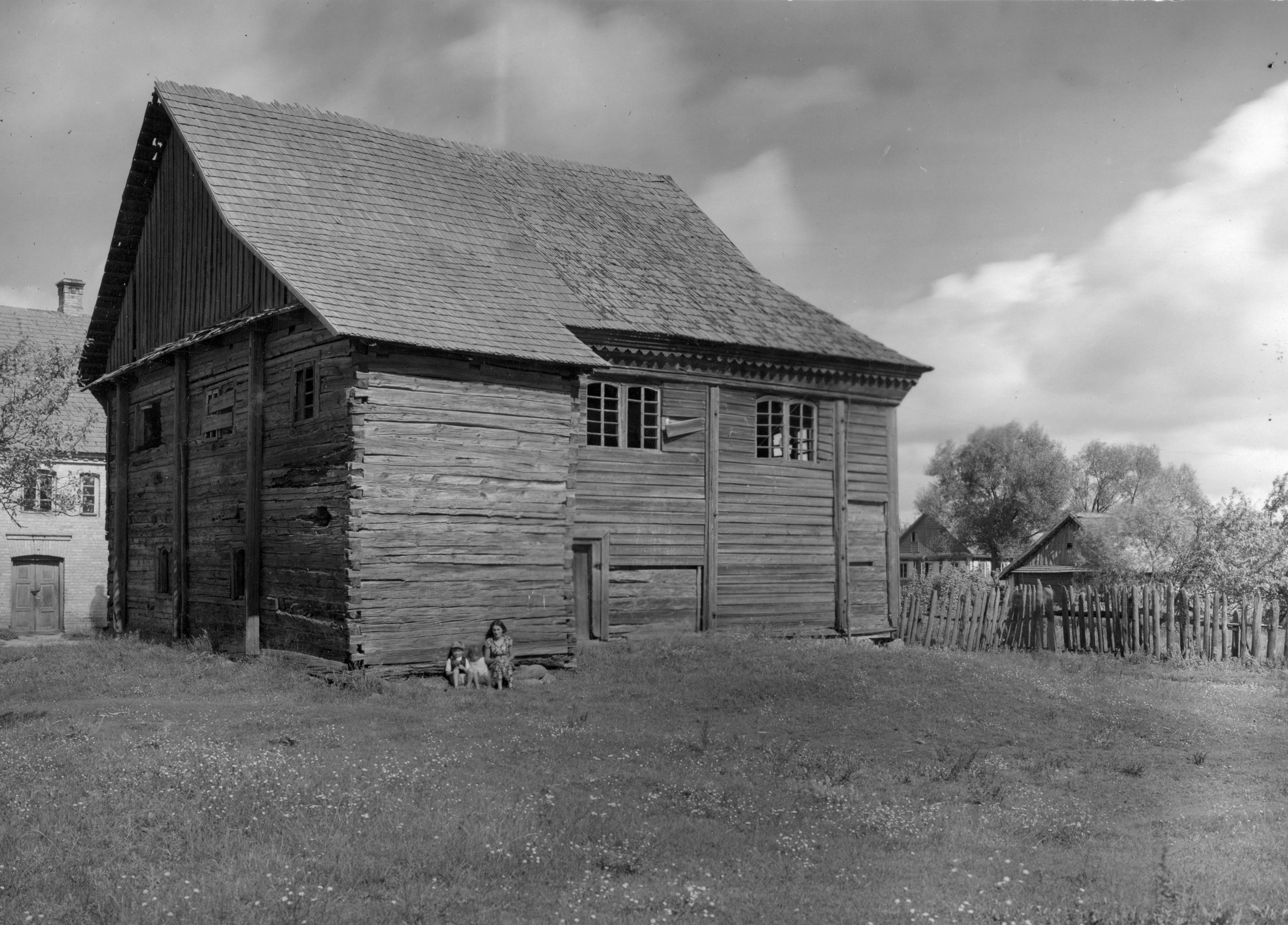 Беларуская (тарашкевіца): Лунна (Łunna). Сынагога